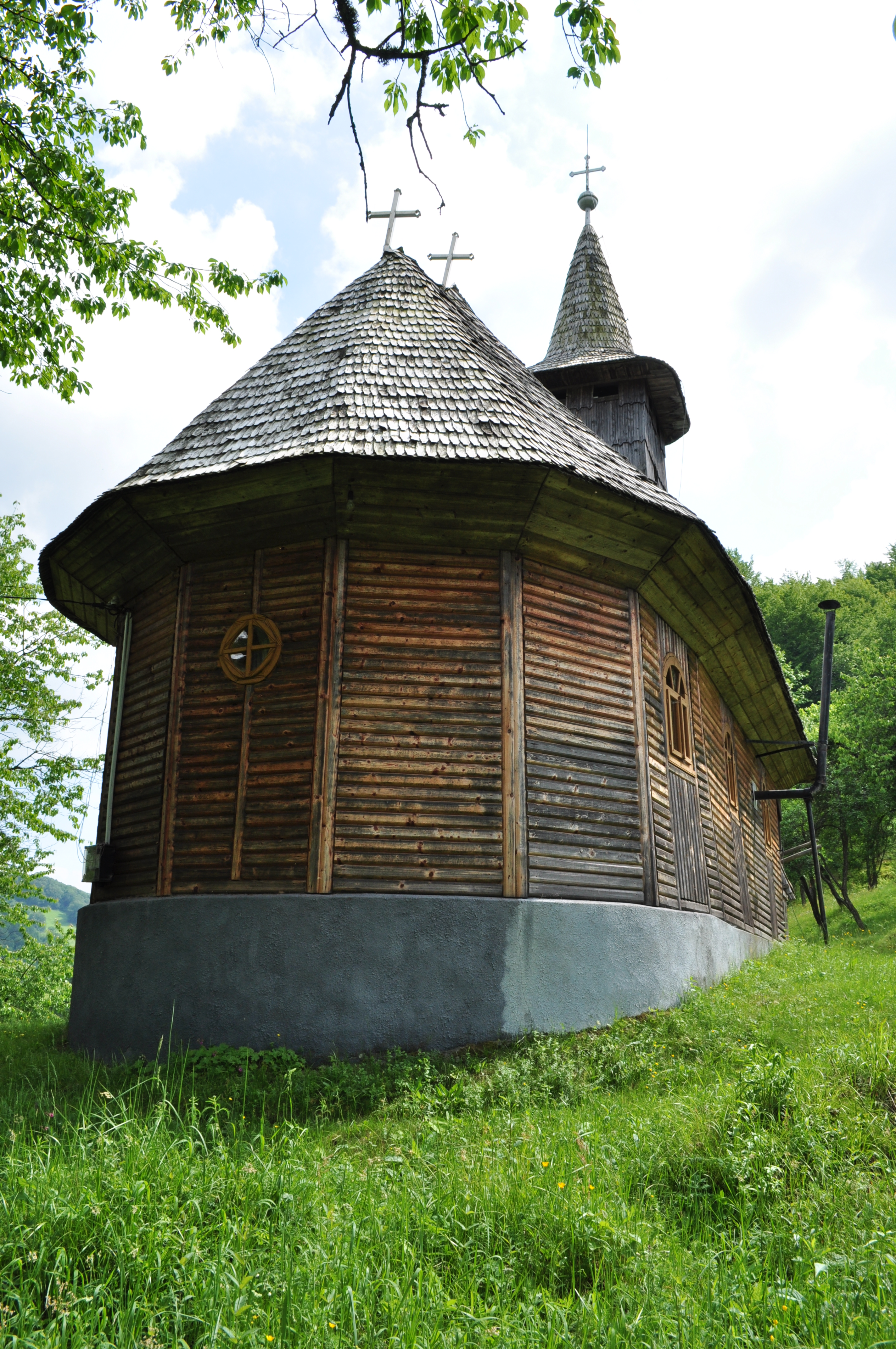 Biserica de lemn "Cuvioasa Paraschiva", sat IZVOARELE; comuna CERNEŞTI